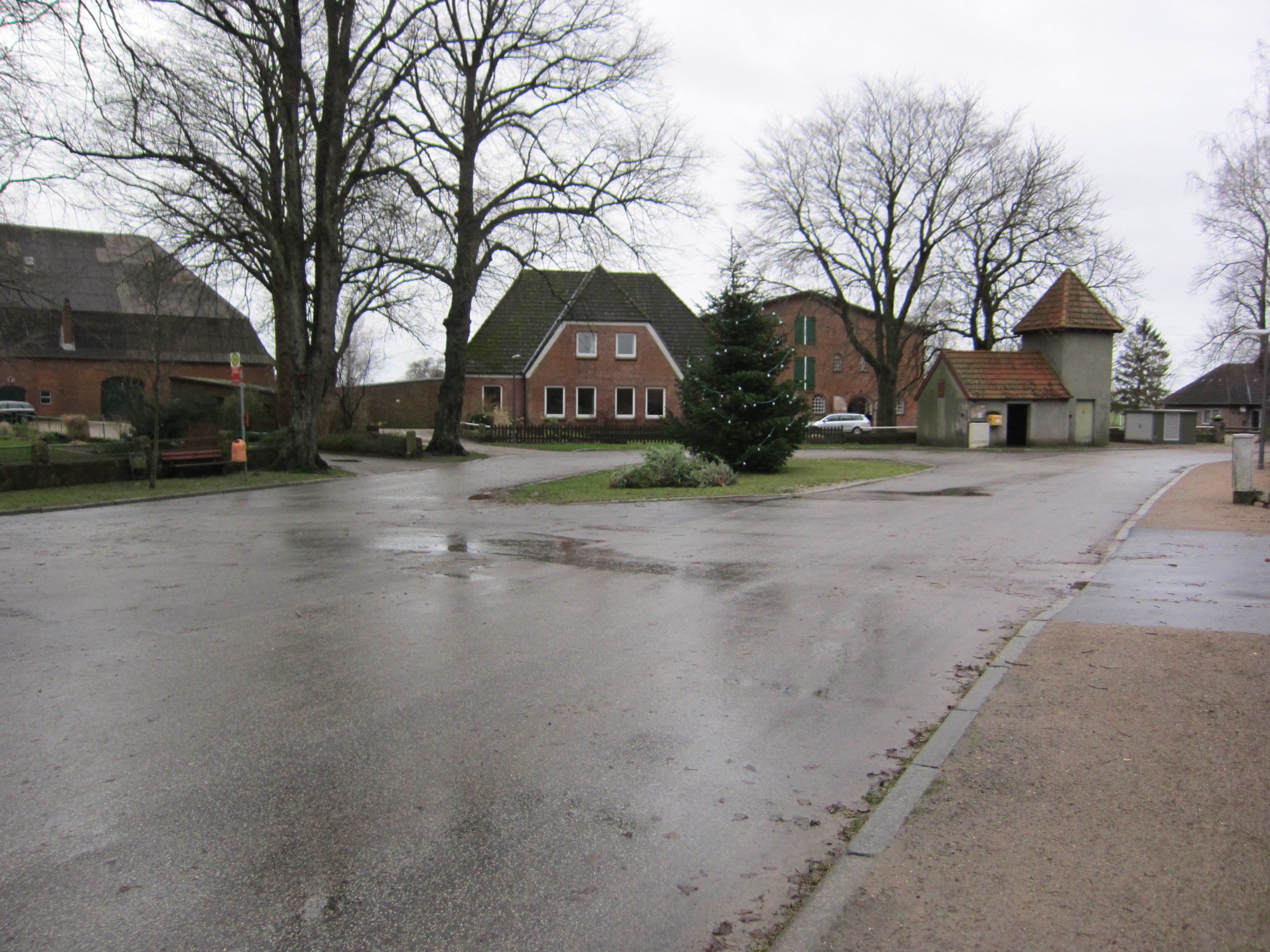 Kiel-Moorsee